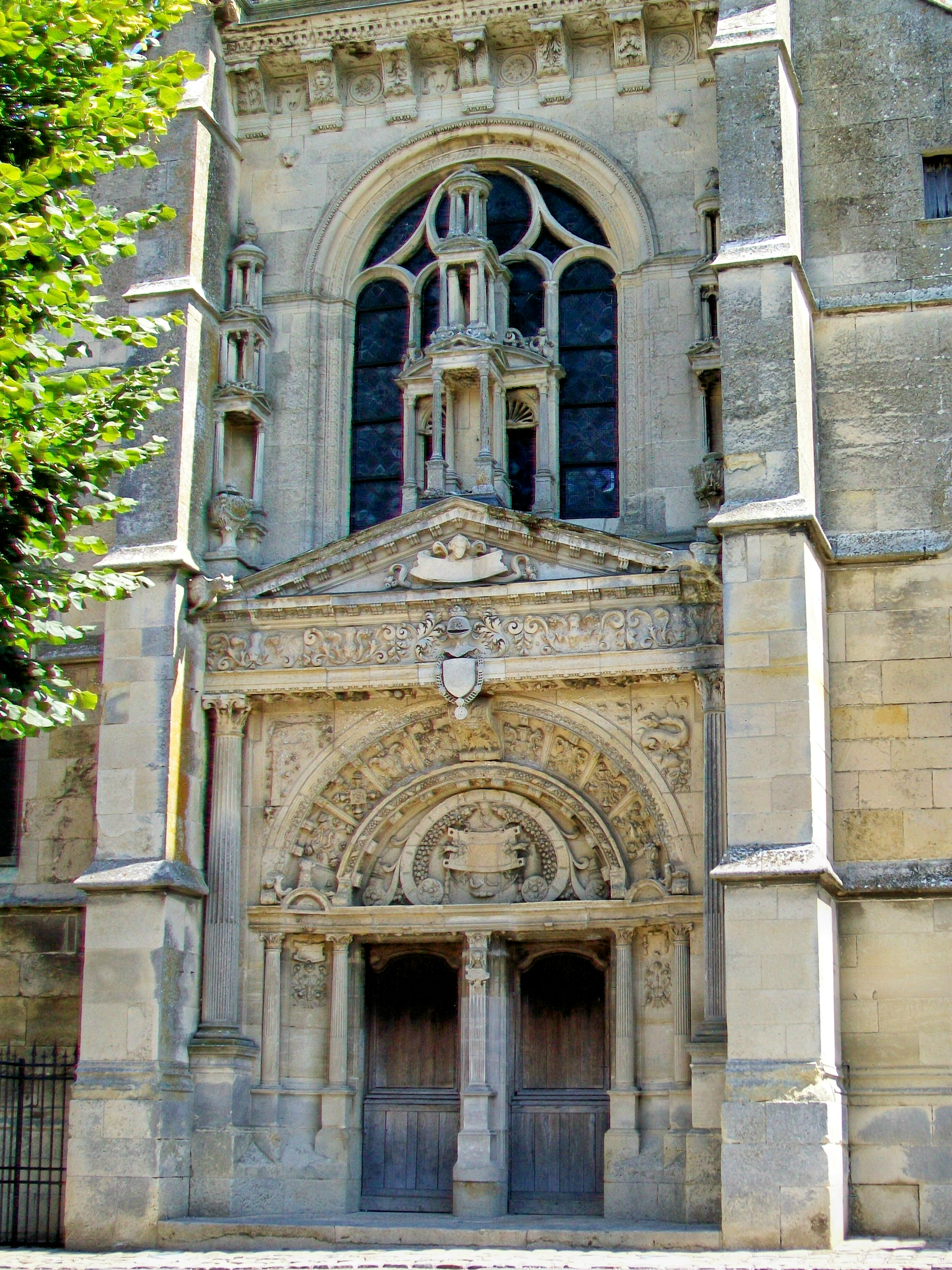 La façade occidentale de style Renaissance, avec notamment un portail richement sculpté.